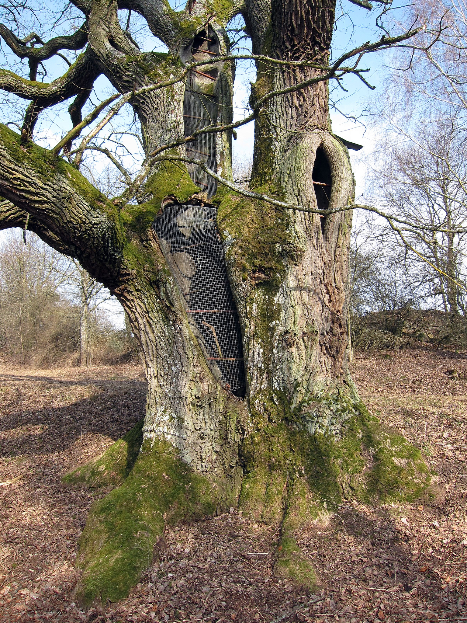 Dreifaltigkeitseiche